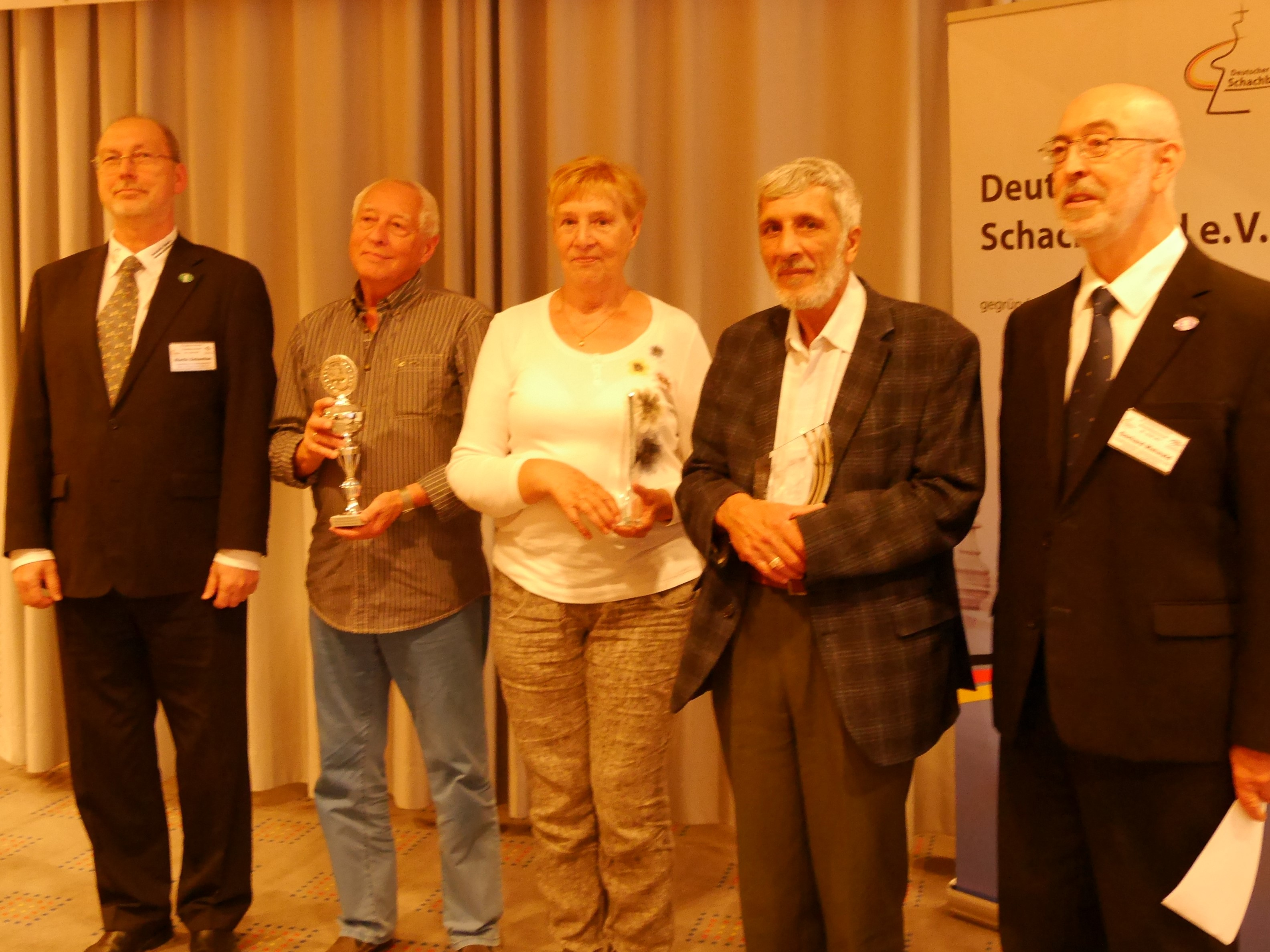 Siegerehrung für die Blitzmeisterschaft der deutschen Senioreneinzelmeisterschaft 2017 in Berlin. Von links nach rechts: Martin Sebastian, Michail Bogorad, Eveline Nünchert, Jakob Meister und Gerhard Maiwald.